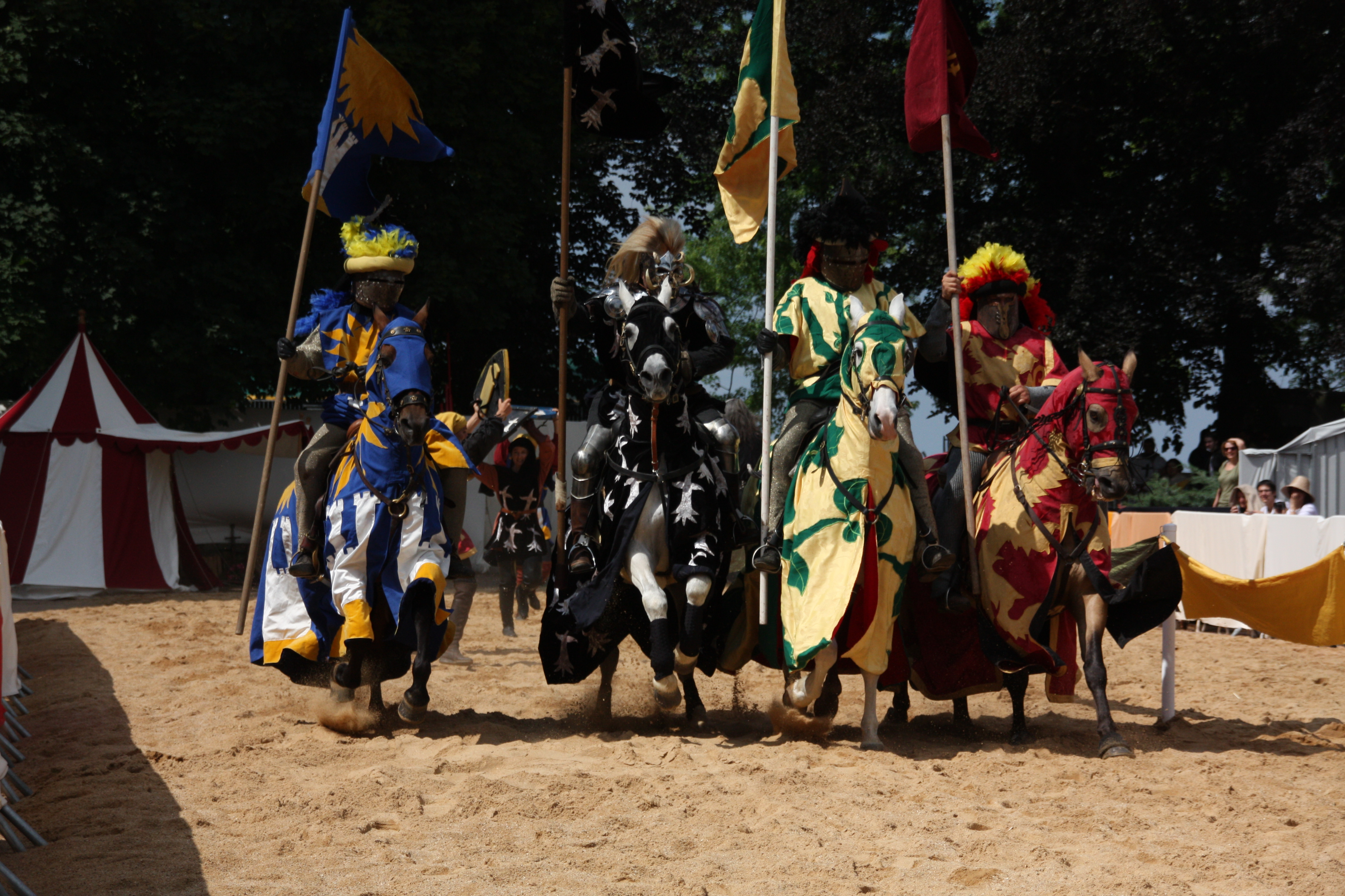 Le Tournoi des bannis Festival médiéval de Montluçon Personality rights warning This work depicts one or more identifiable persons. The use of depictions of living or deceased persons may be restricted by laws regarding personality rights. The extent of these restrictions depends on jurisdiction. Personality rights restrictions apply independently of copyright. Before using this content, please ensure that the intended use does not infringe any personality rights under applicable laws. You are solely responsible for ensuring that you do not infringe someone else's personality rights. See our general disclaimer.